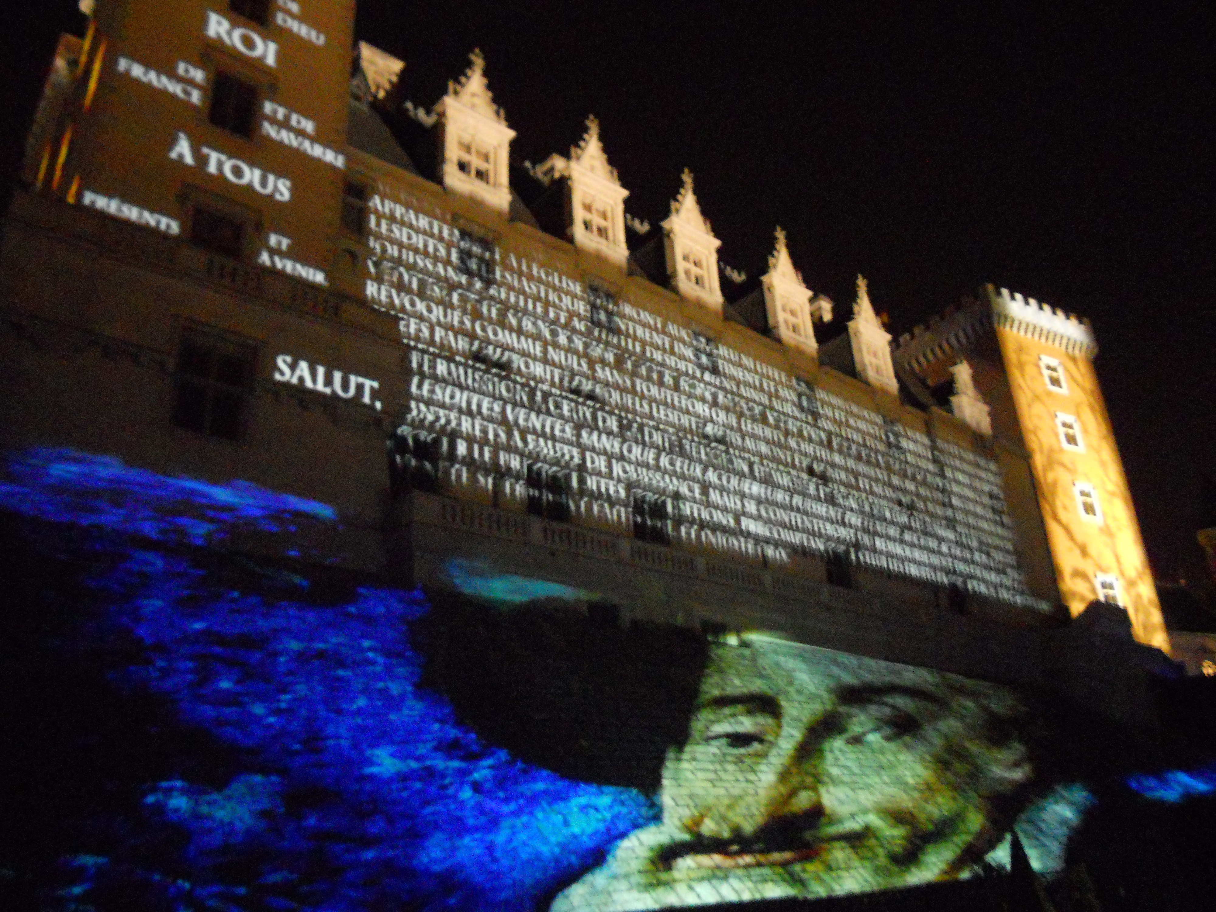 Château de Pau durant un spectacle d'illuminations